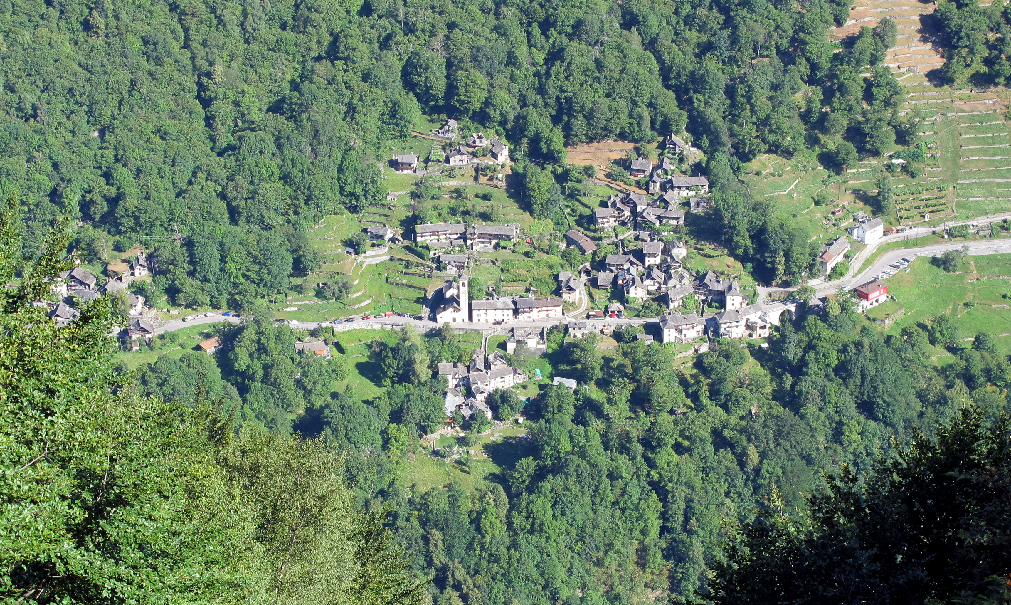 Das Dorf Linescio im Valle di Campo (Kanton Tessin, Bezirk Vallemaggia, Kreis Rovana)